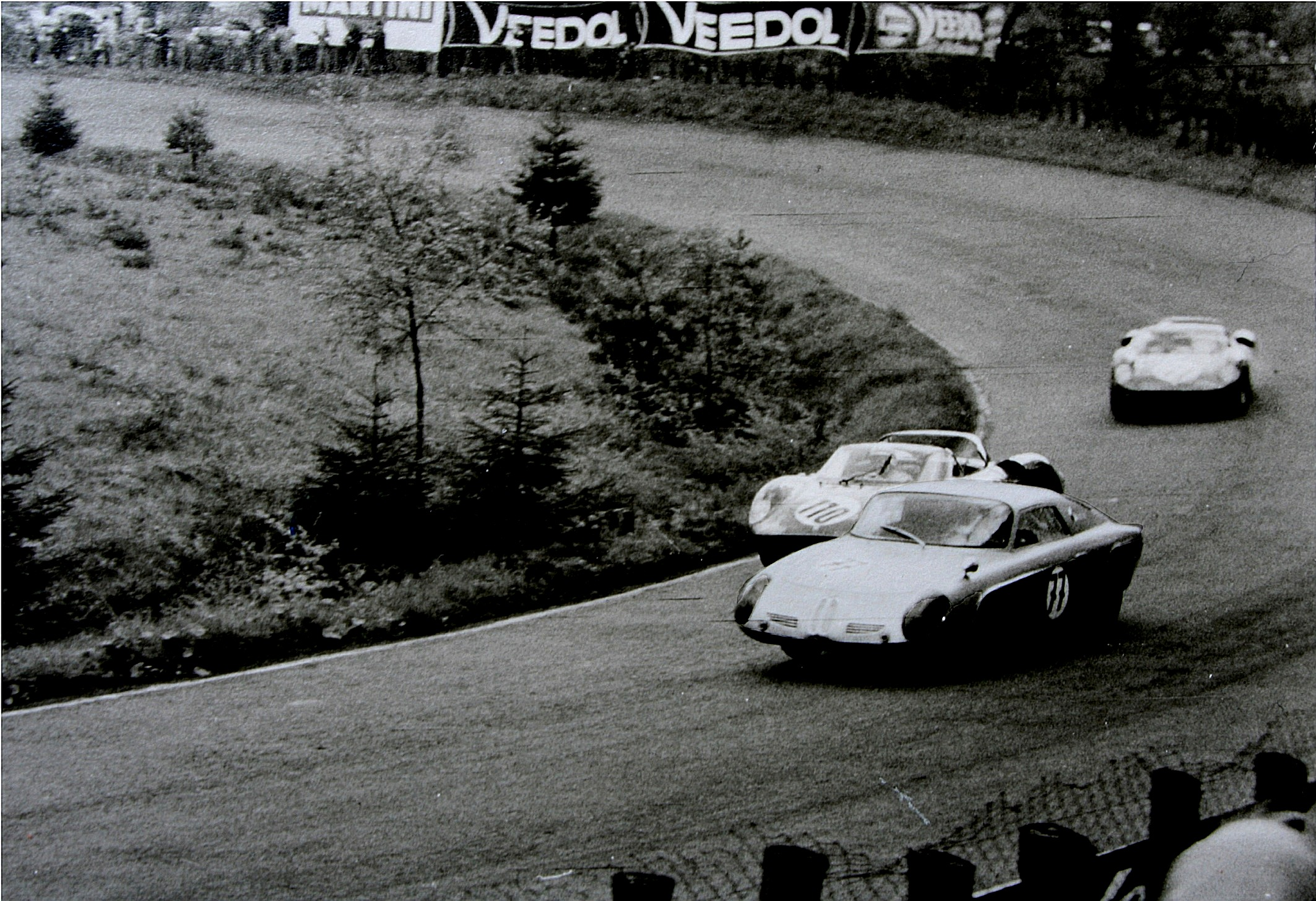 Martini-BMW auf dem Nürburgring, Südkehre; Rennsportwagen auf der Basis des BMW 700